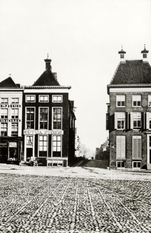 Societeit Mutua Fides in café 'De Pool' op de hoek van de Oude Ebbingestraat en de Grote Markt in 1823